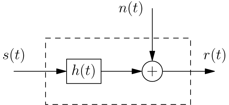 Linear Time-invariant Channel Model